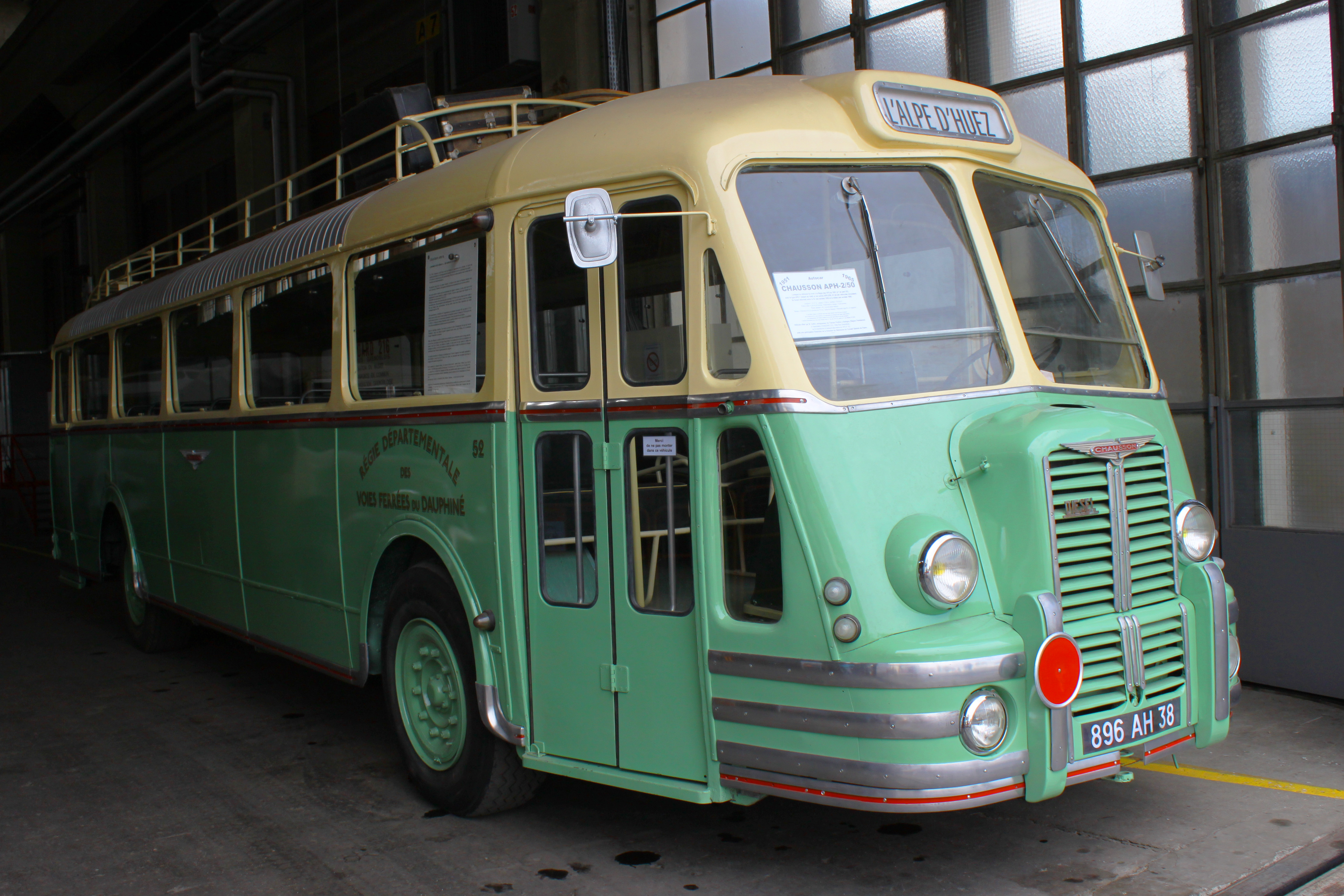 Autobus Chausson APH2-50 restauré par l'association Standard 216 - Histobus grenoblois en VFD n°52